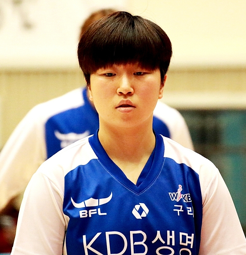 160220 여자농구 KDB생명 vs KB스타즈 직찍